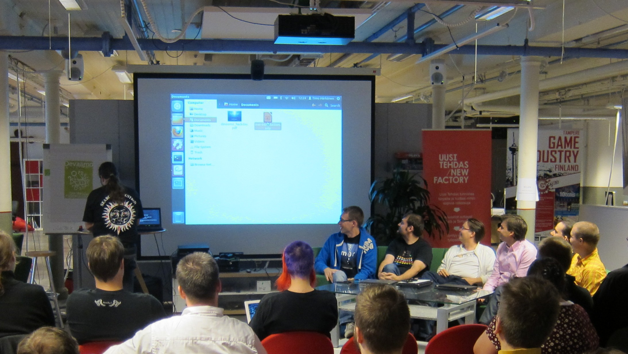 Kuvassa on Jollan henkilökuntaa esittelemässä Jollaa yrityksenä sekä Mer ja Nemo-projekteja Hackaday-tapahtumassa 8.9.2012. Paikkana Uusi tehdas, Väinö Linnan Aukio 15, Tampere. lisätietoja tapahtumasta